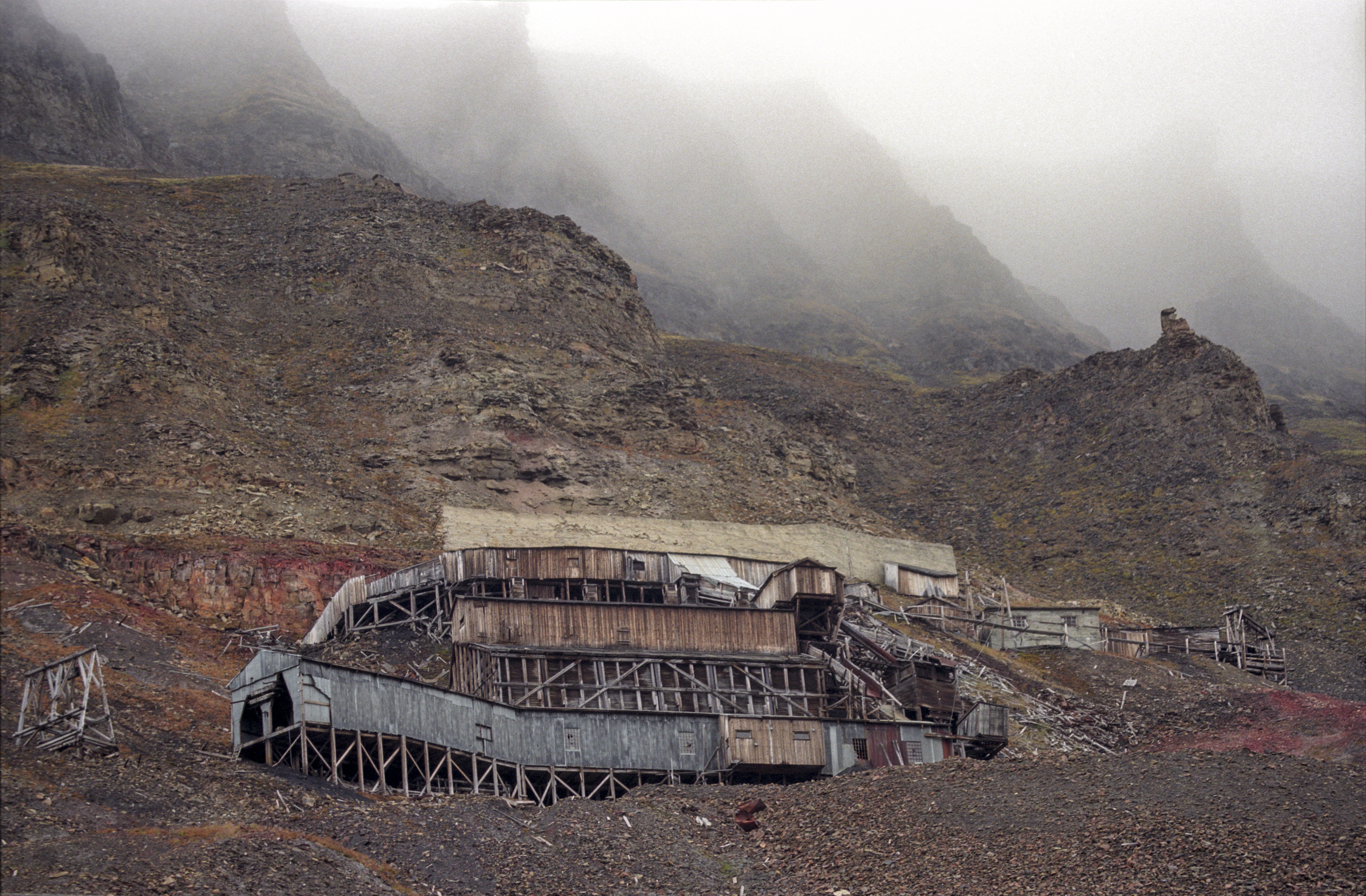 spitsbergen, Longyearbyen, old mine